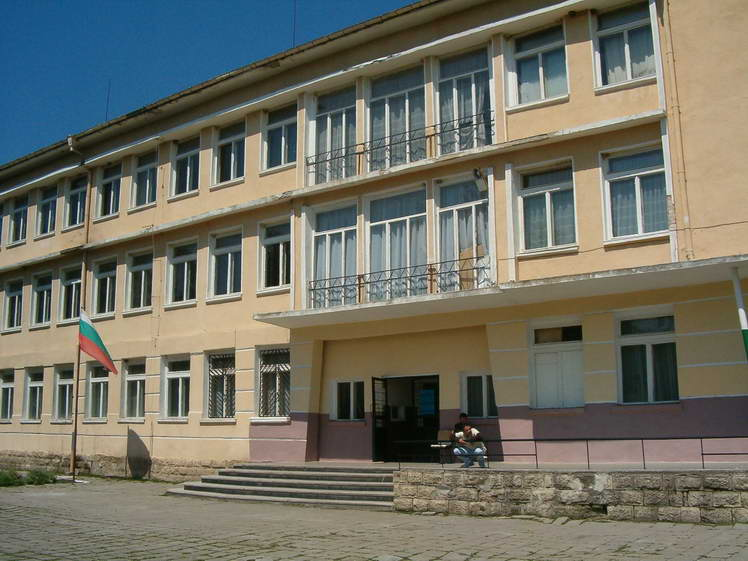 Сградата на ОУ "Васил Левски" на село Крепча, Опаченско